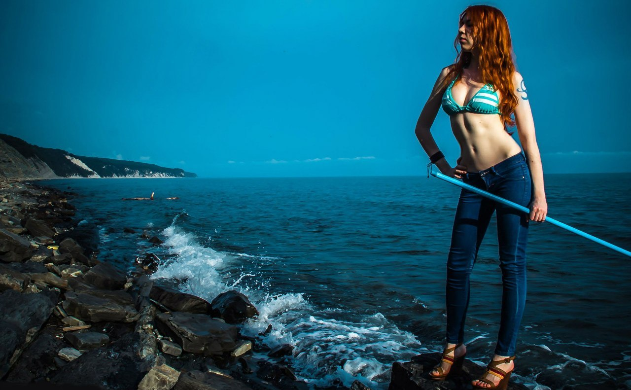 фотокосплей